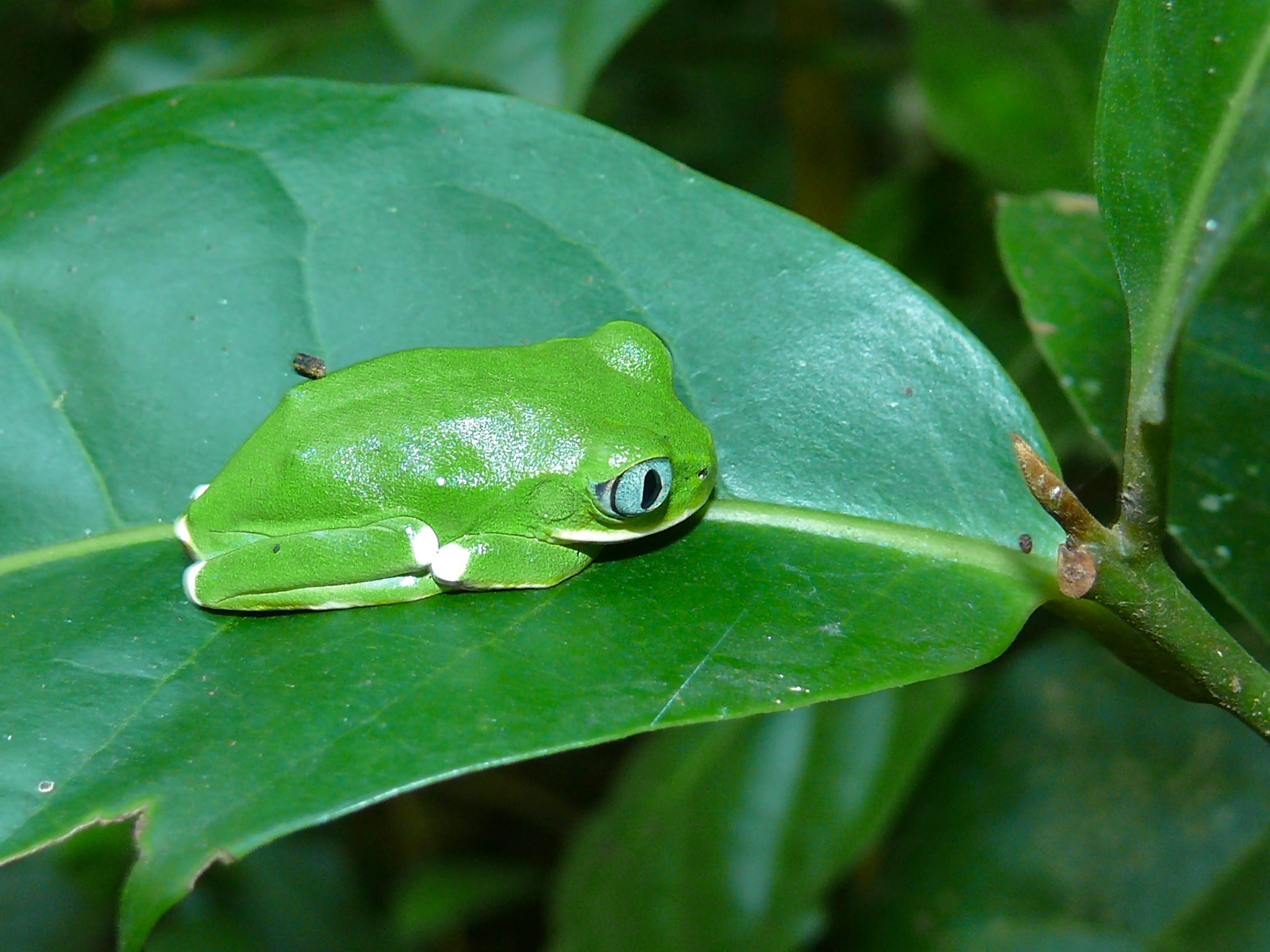 Kibale Forest NP, UGANDA